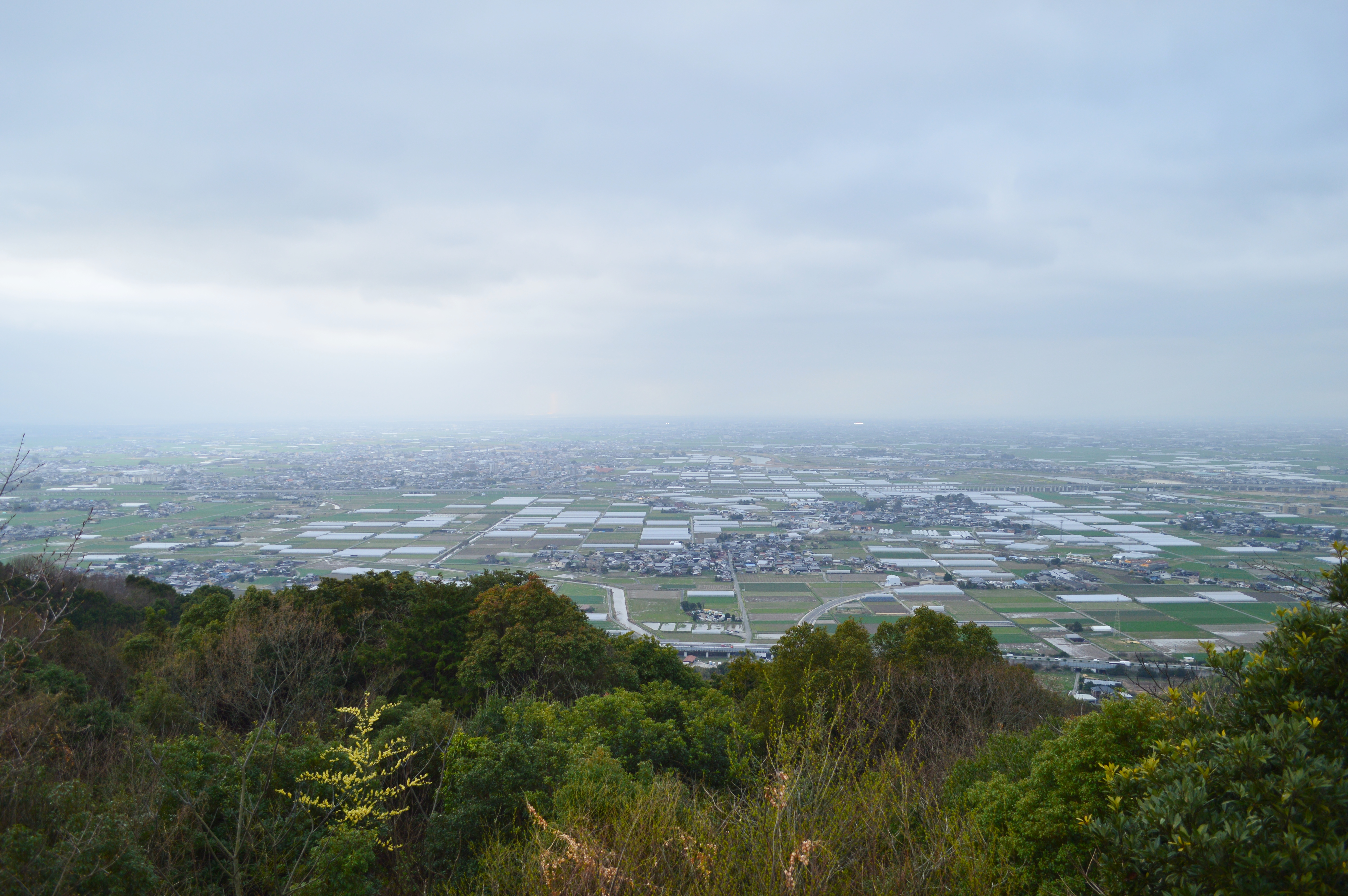 女山神籠石から筑後平野を望む